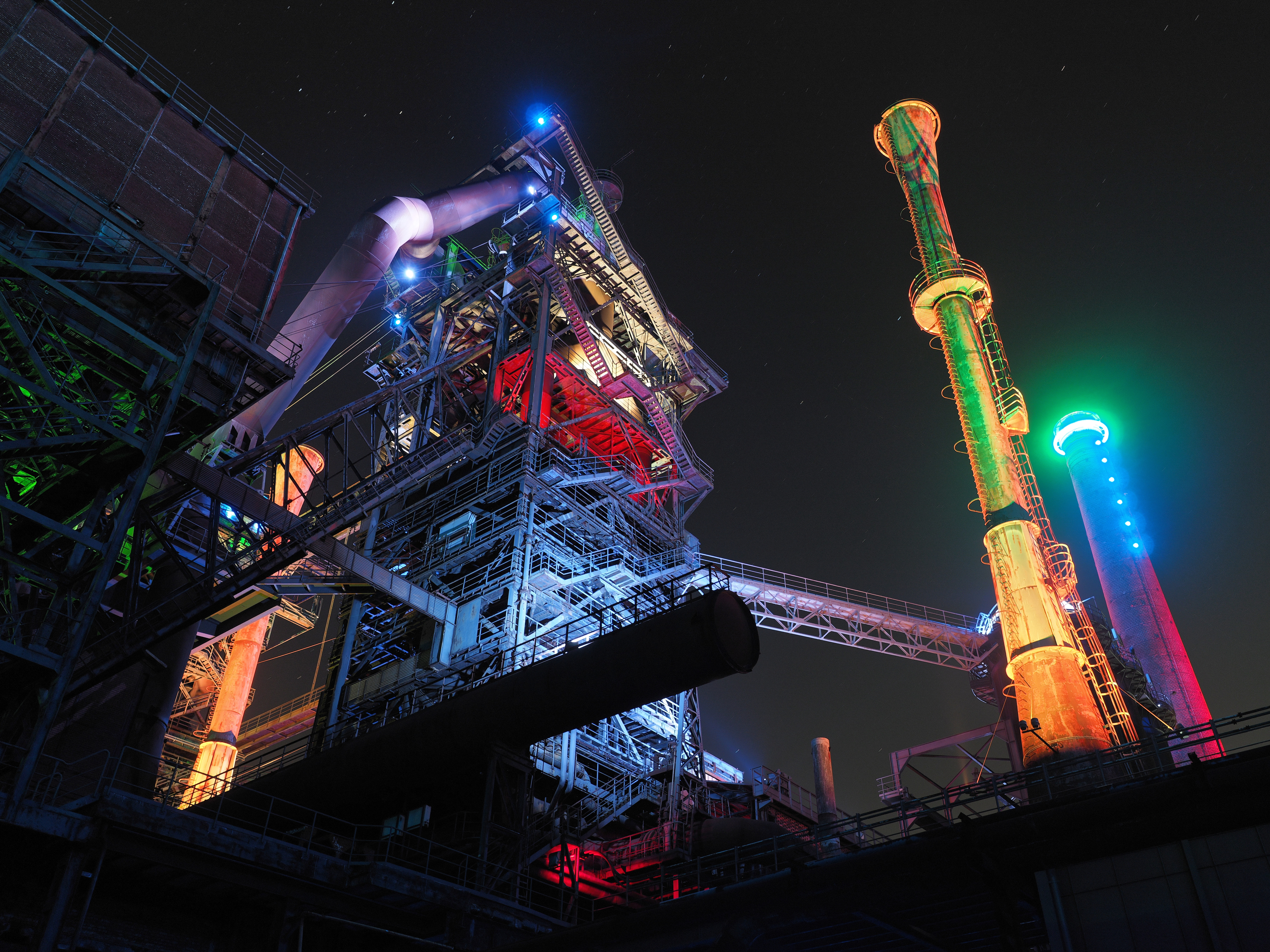 Der Hochofen 2, Fackel und Schornstein im Landschaftspark Duisburg, gesehen von der Hochofenstraße This image shows a heritage building in Germany, located in the North Rhine-Westphalian city Duisburg-Meiderich/Beeck (no. 506).